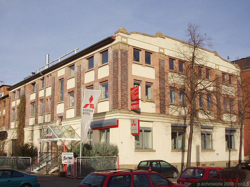 Denkmalgeschütztes Gewerbeanwesen des Spar- und Konsumvereins in der Happelstraße 29 in Heilbronn, heute Gewerbebetrieb